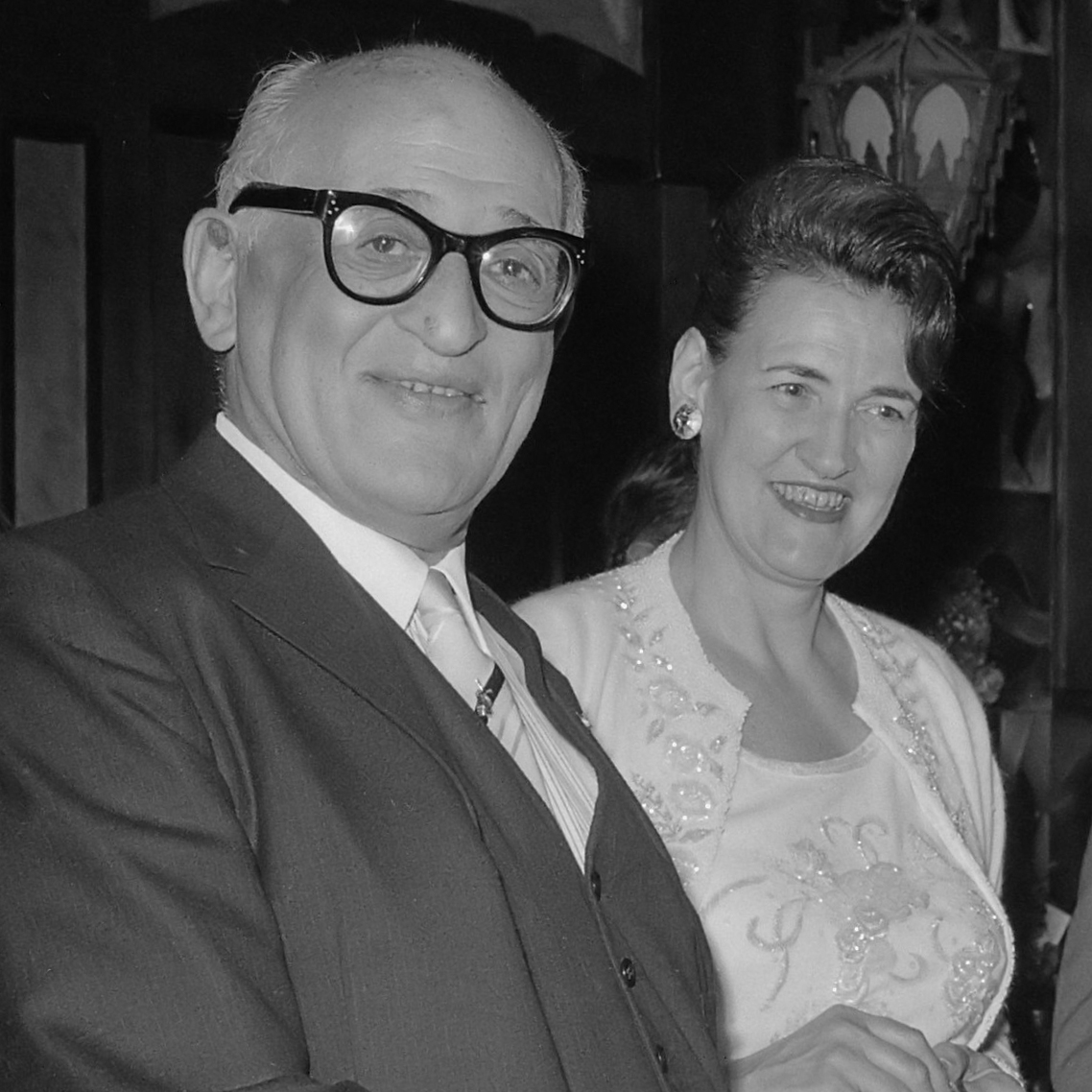 Orkestmusicus Max Tak tijdens de viering van zijn 75 jarige verjaardag *31 augustus 1966